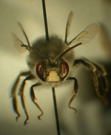 Habropoda miserabilis male